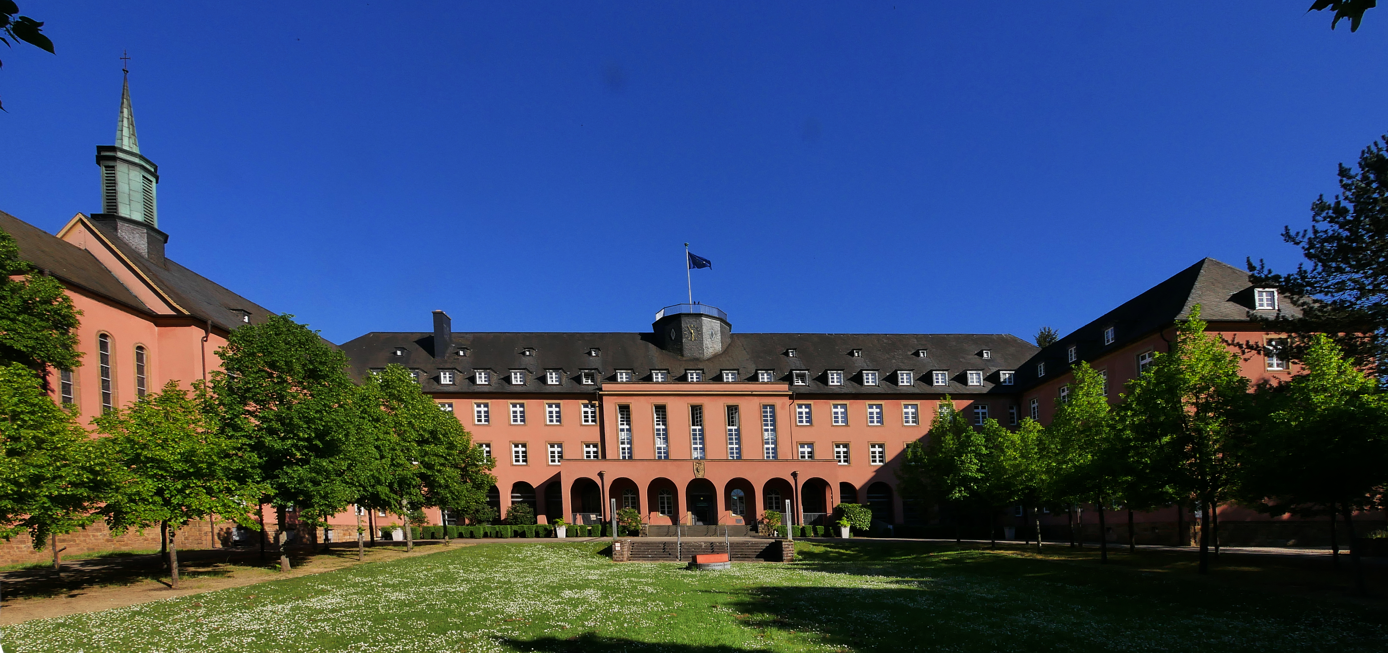 Robert Schumann Haus des Bistums Trier (von der Bergseite) ex Katholische Akademie Trier ex Priesterseminar Rudolfinum